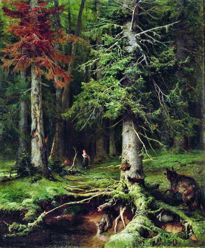 Красная шапочка